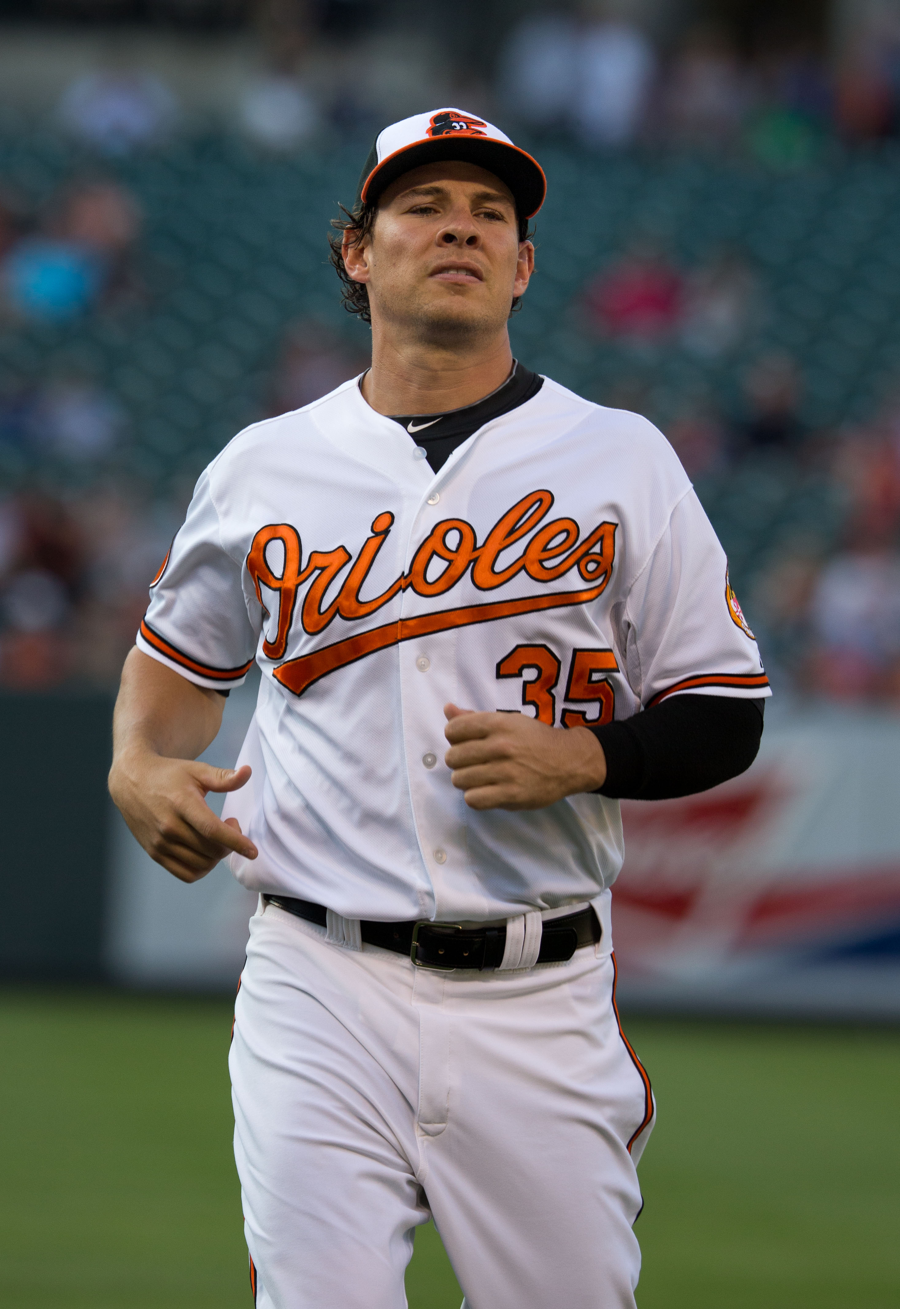 Danny Valencia